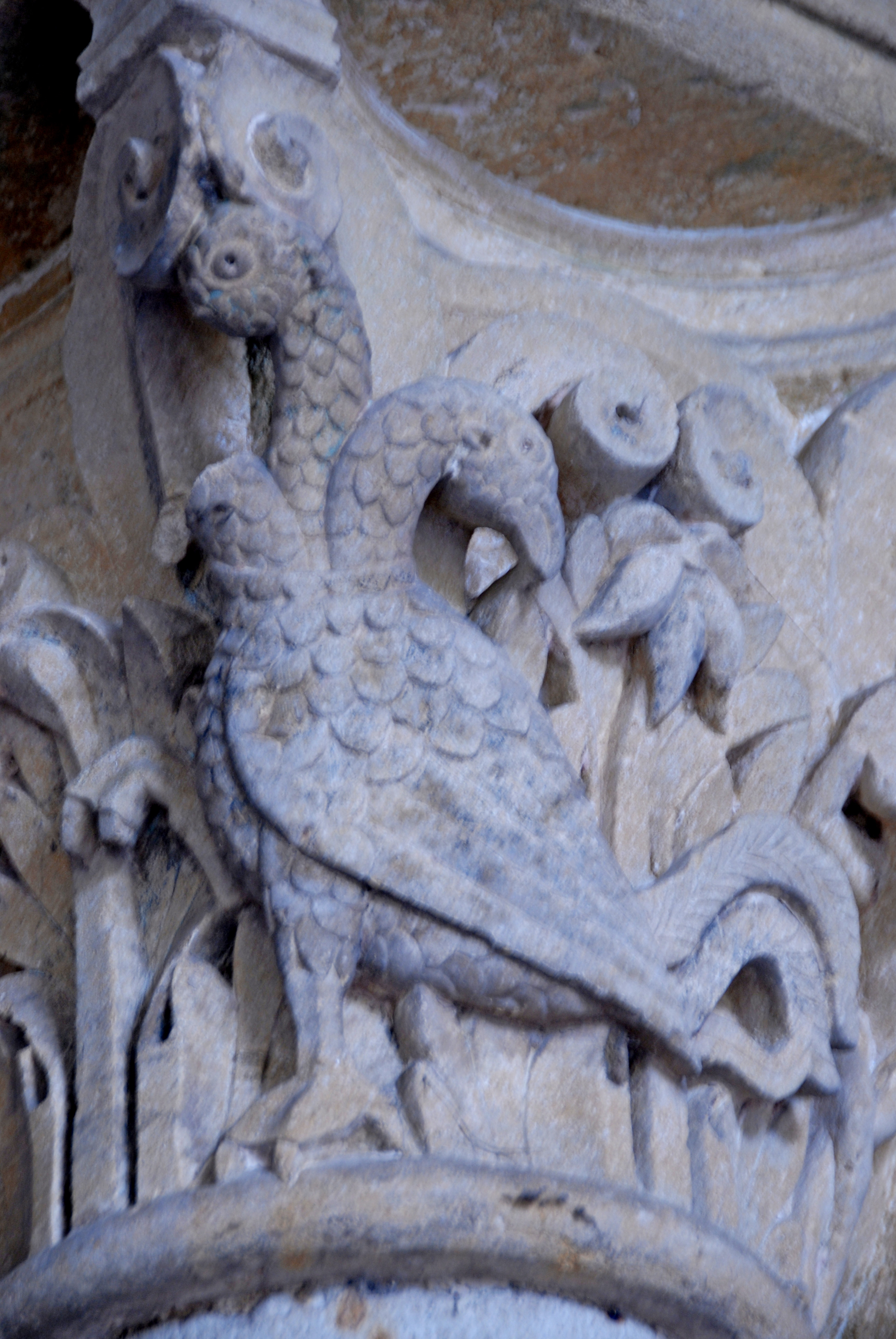 Portalvorbau, Kapitell, Dreiköpfiger Vogel